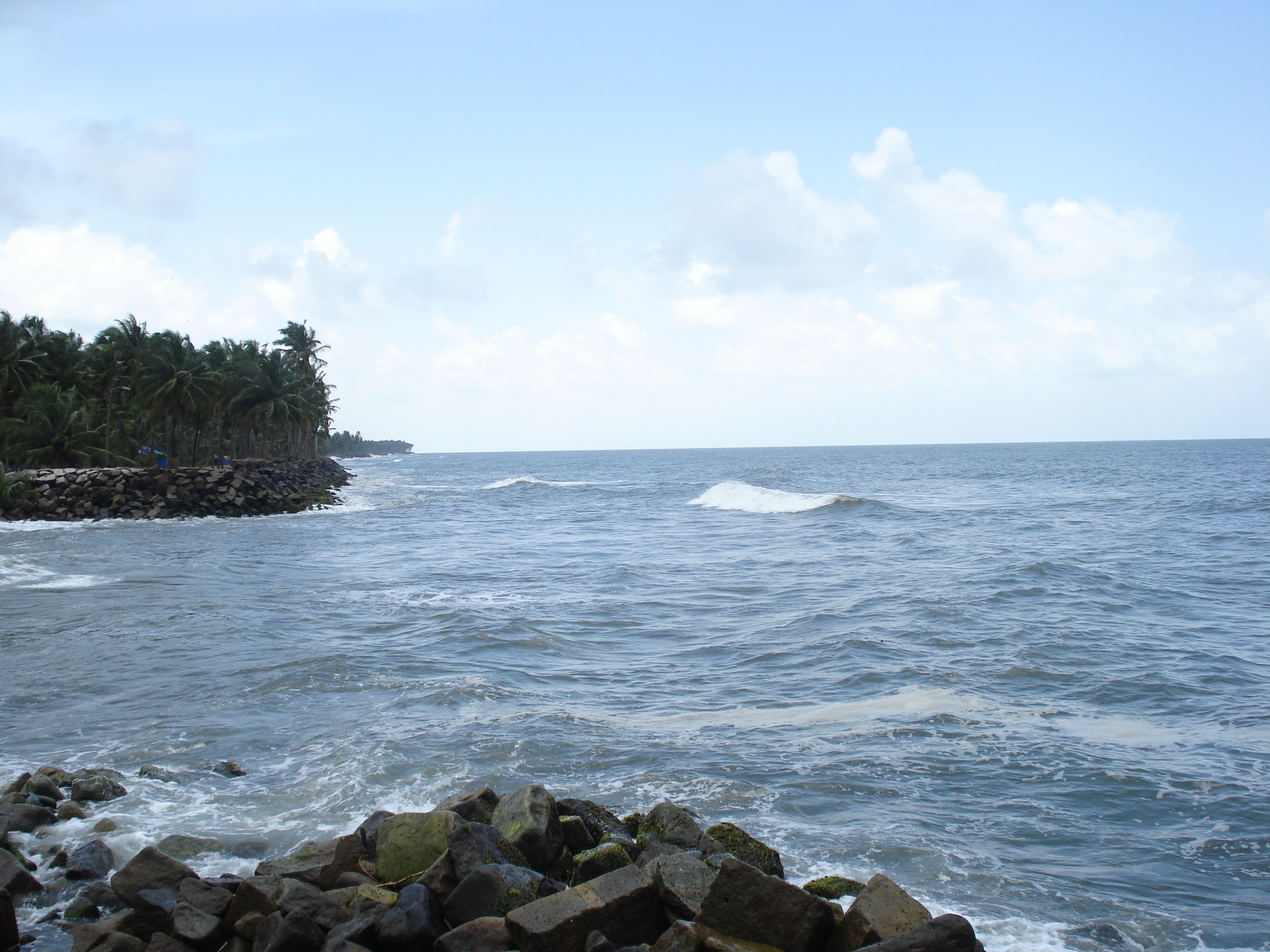 ഇവിടെയാണ് പെരിഞ്ഞനത്തുള്ള പള്ളിയിൽ ക്ഷേത്രത്തിലെ ആറാട്ട് നടത്താറ്‌. ആറാട്ട്കടവ് എന്നു പേരുമുണ്ട്‌